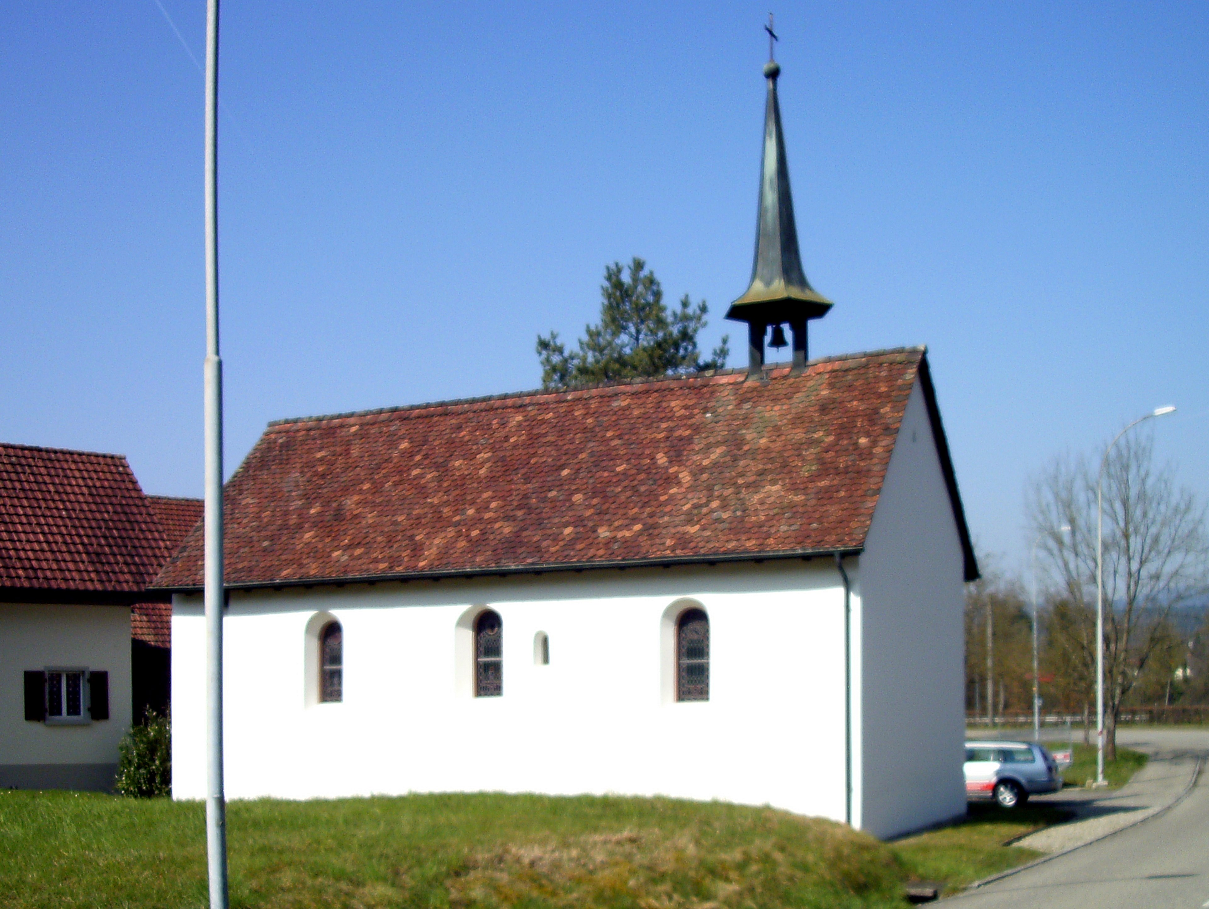 Kapelle St. Margaretha in Rheinsulz, Kanton Aargau, Schweiz